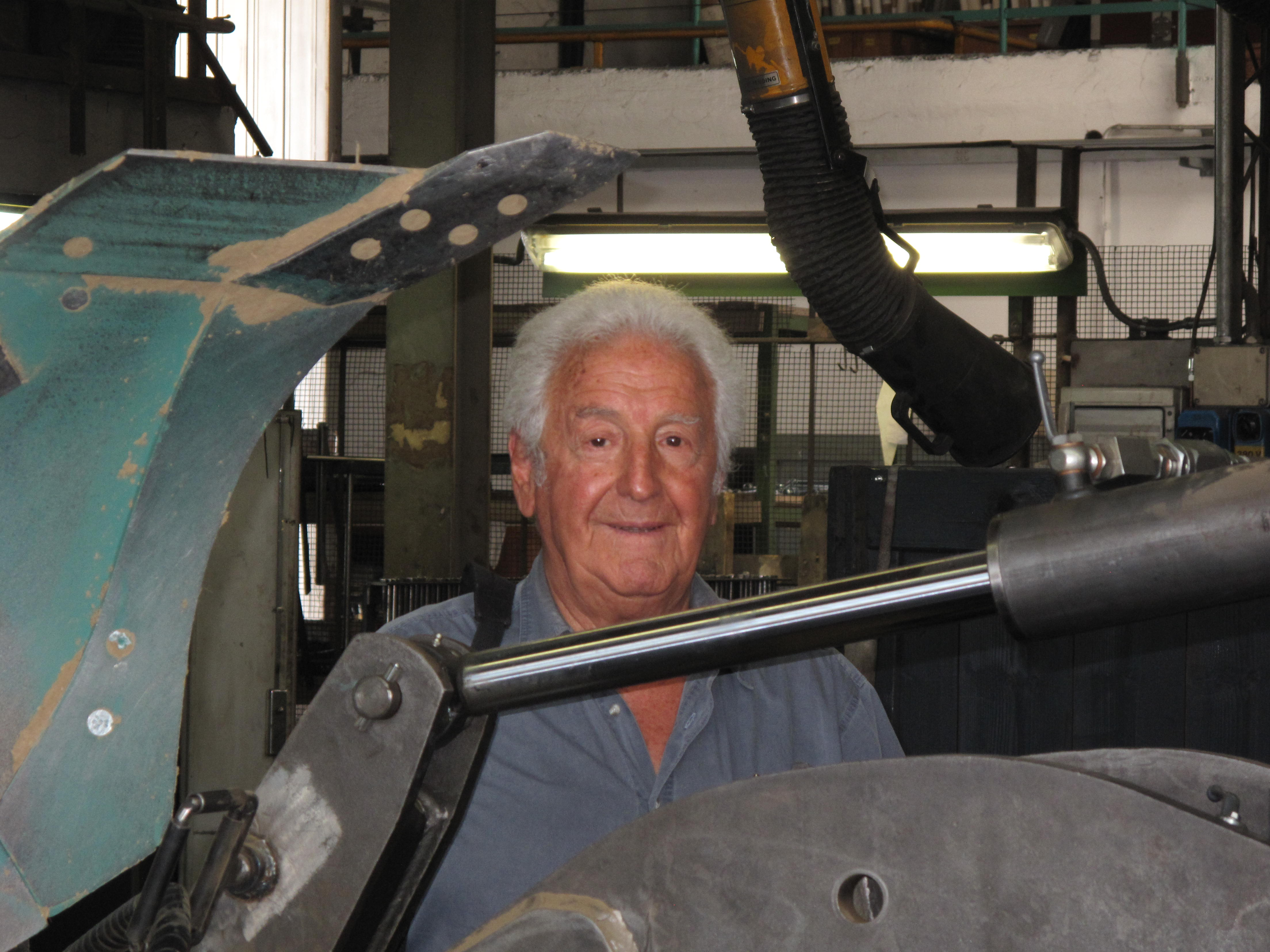 Venanzio Vallerani